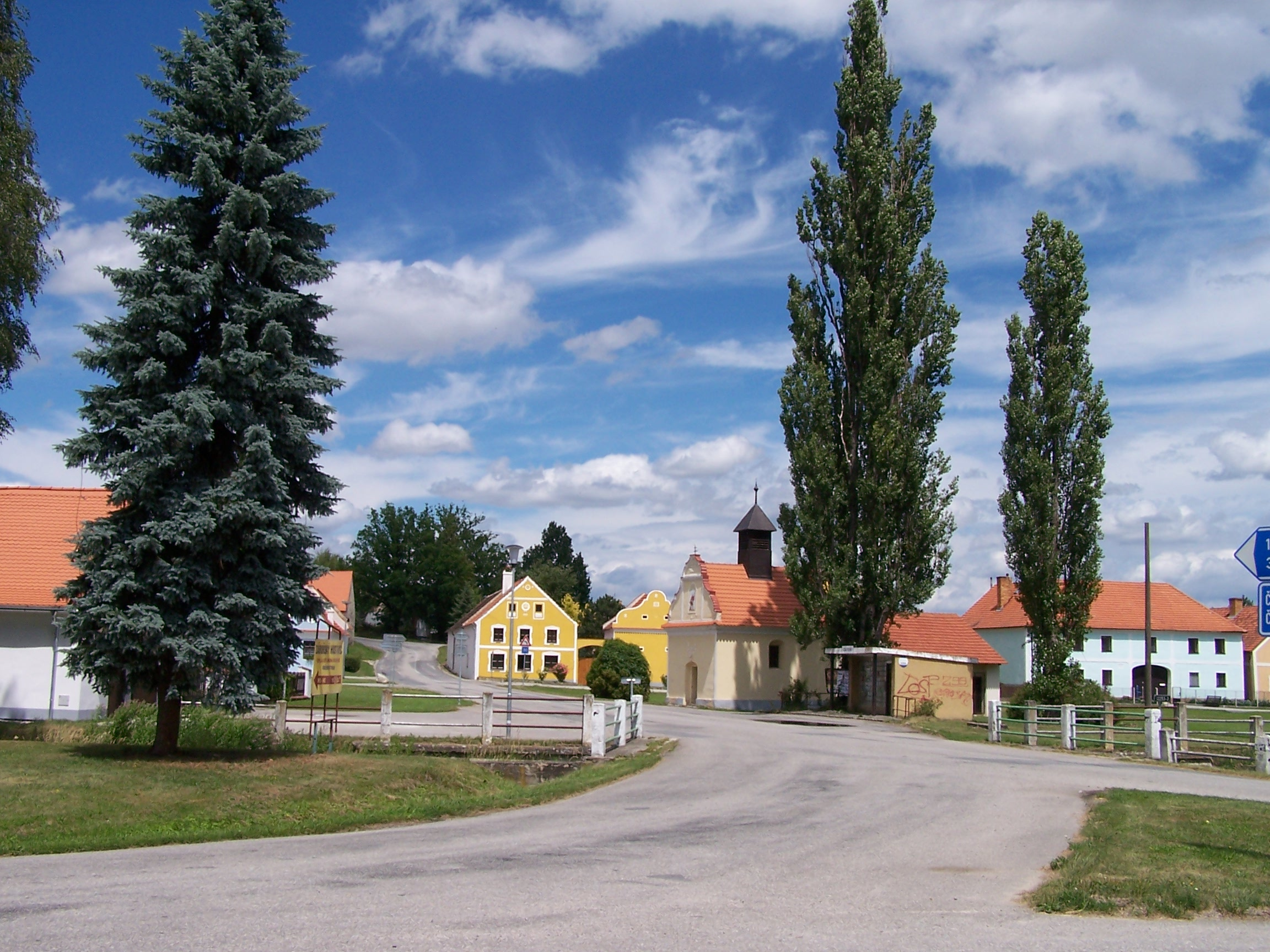 Náměstí v Záboří, okres České Budějovice